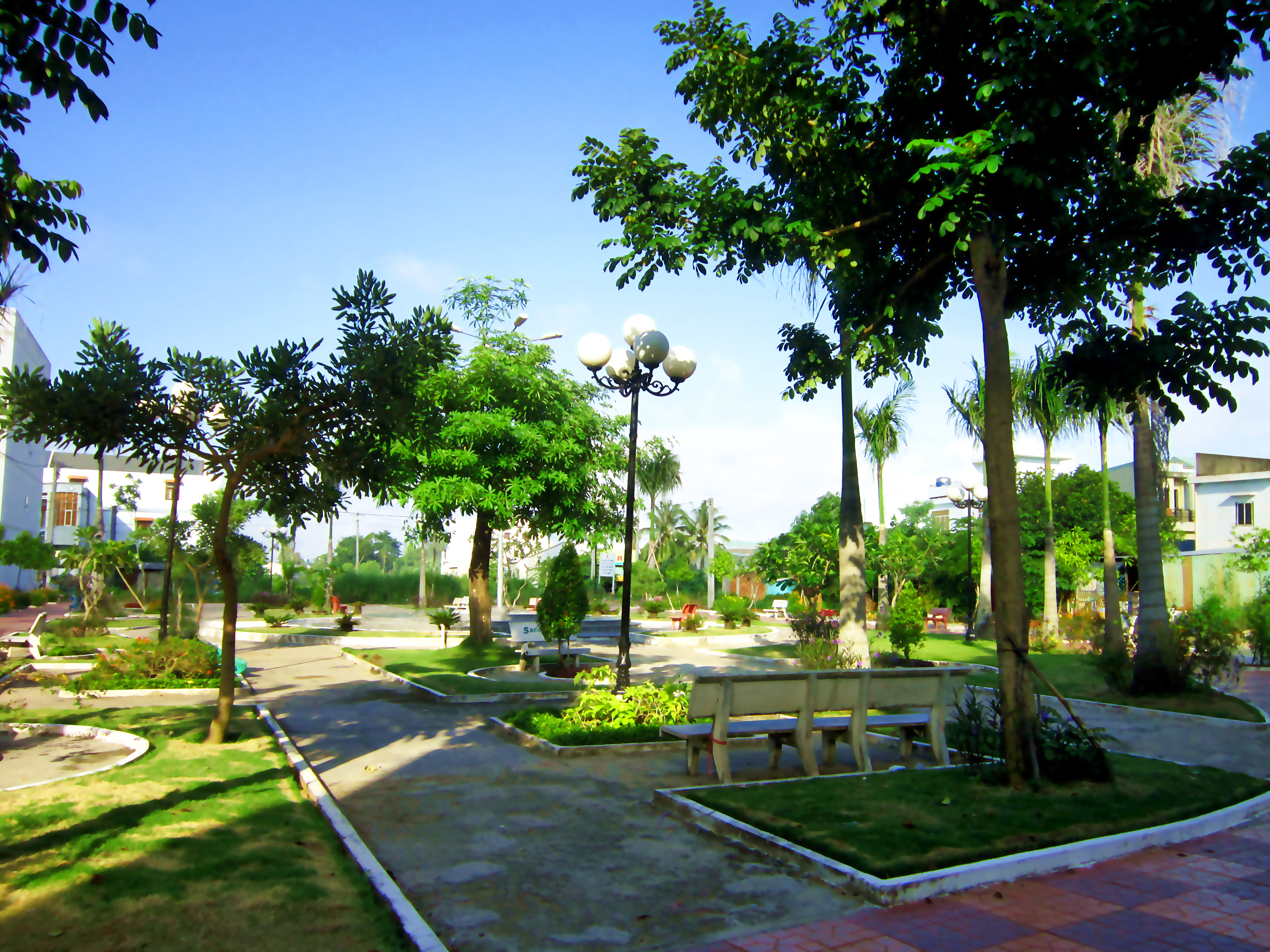 Công viên ở gần chợ Mỹ Quý, thuộc phường Mỹ Quý, thành phố Long Xuyên, An Giang, Việt Nam.